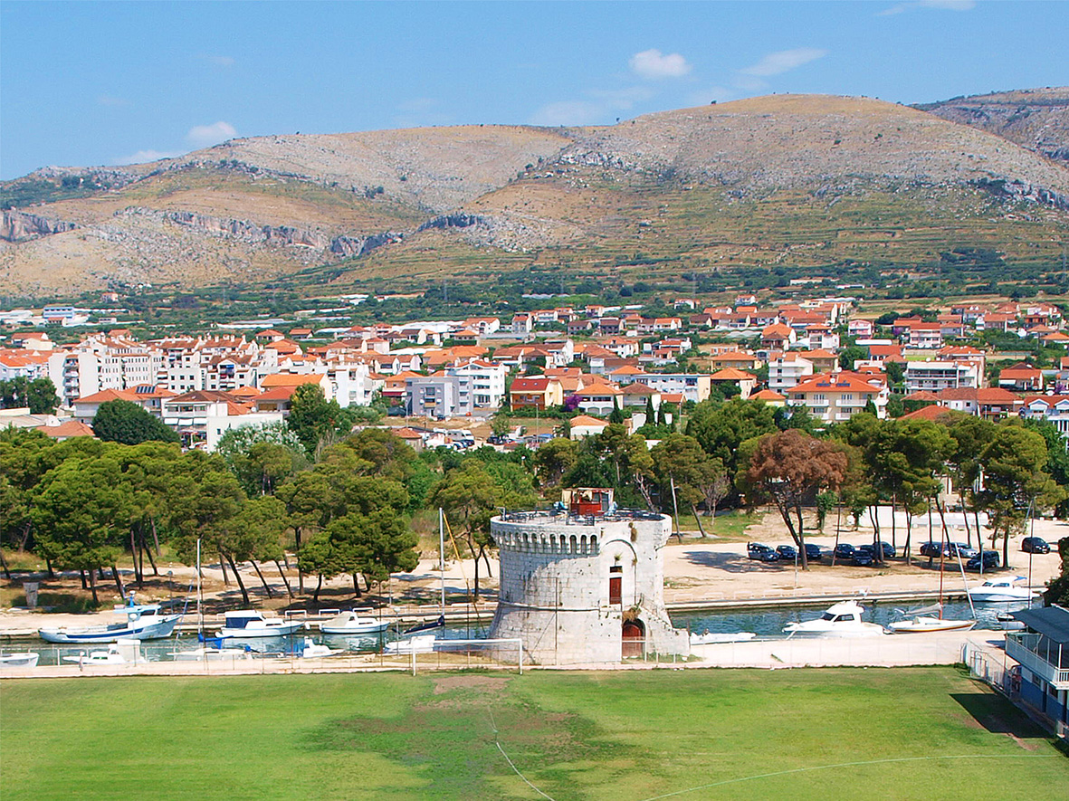 Фортеця Камерленґо. Вежа святого Марка